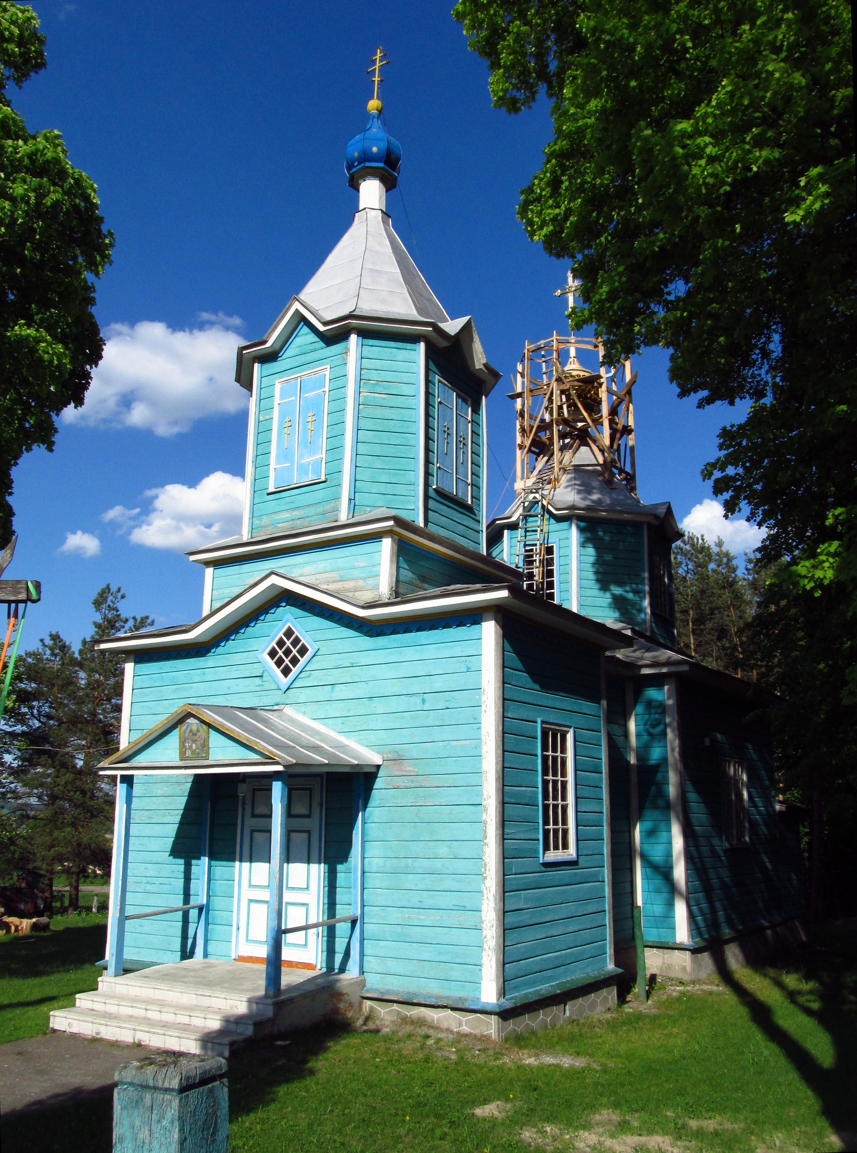 Деревяний храм в с.Грядки